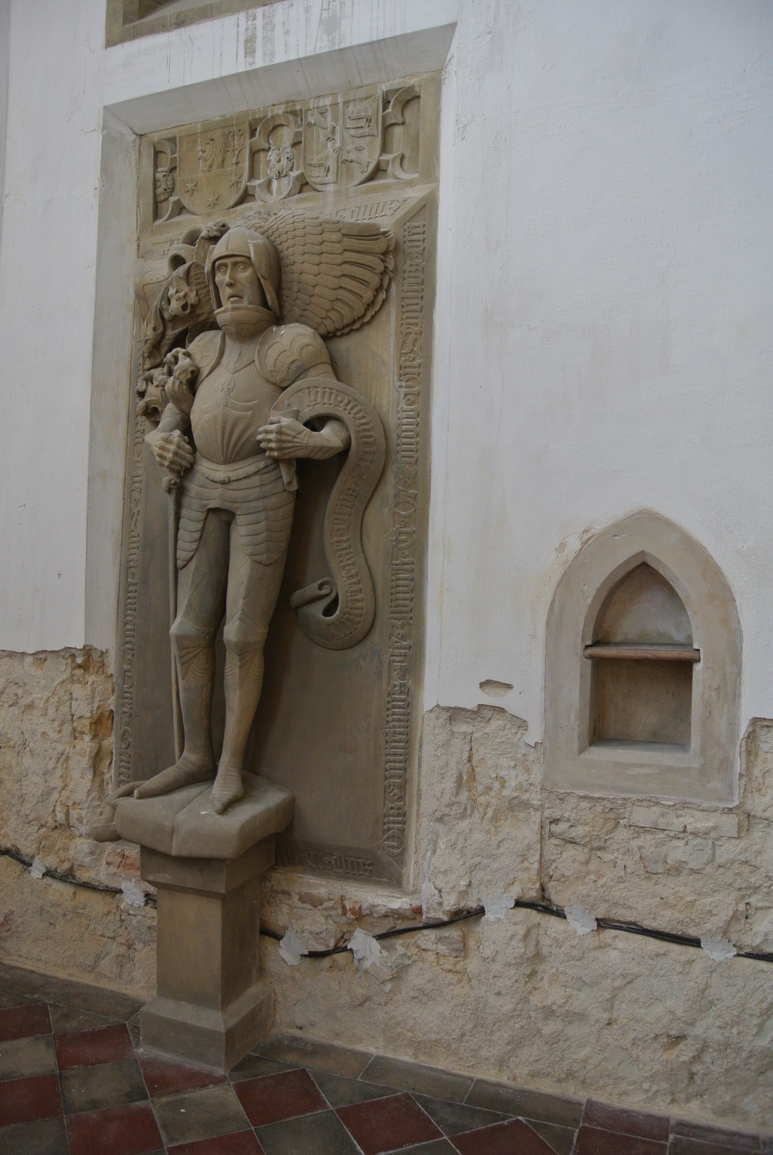 Detaily kostela v Charvatcích